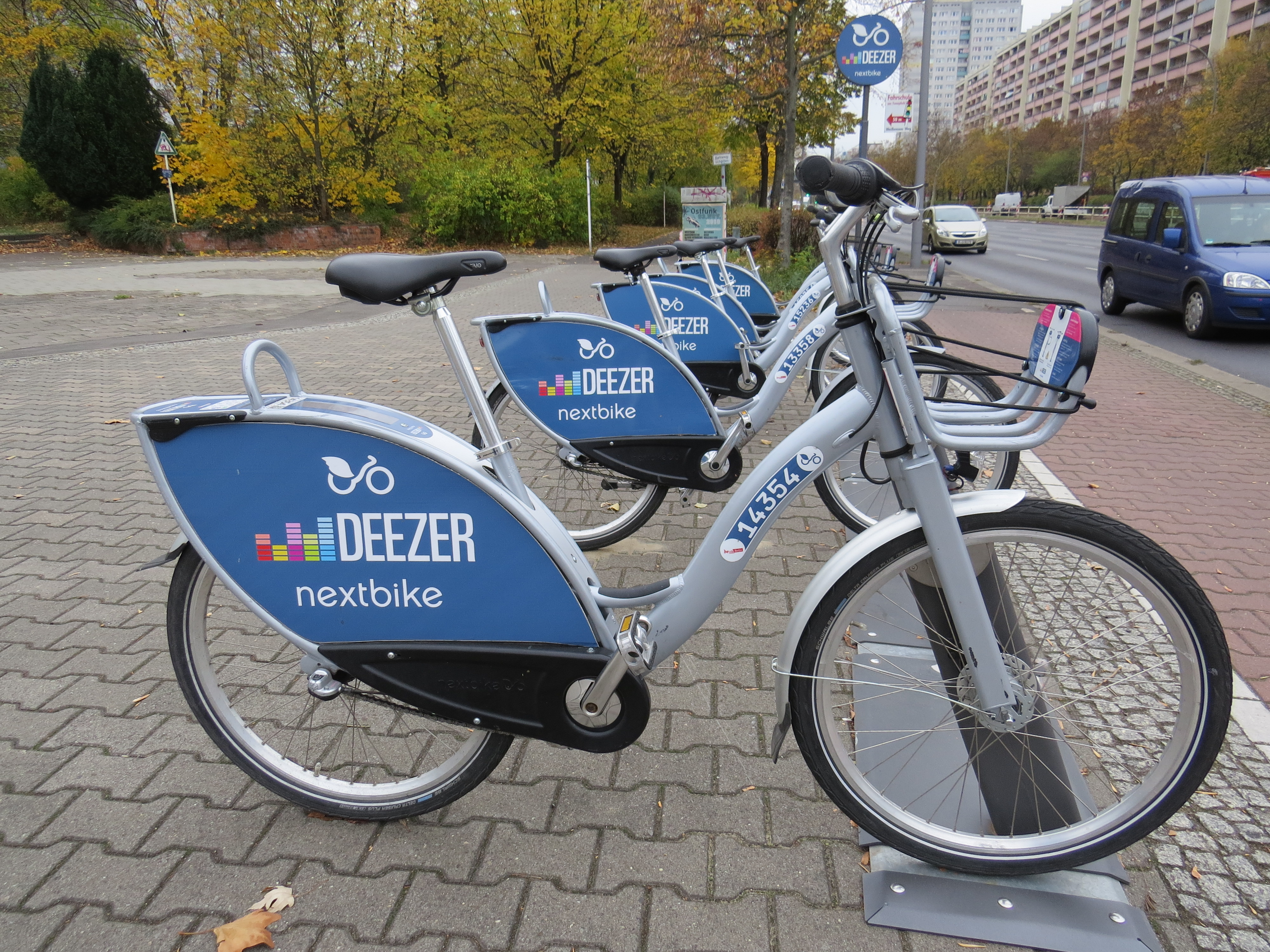 Fahrradleihstation Deezer in Berlin